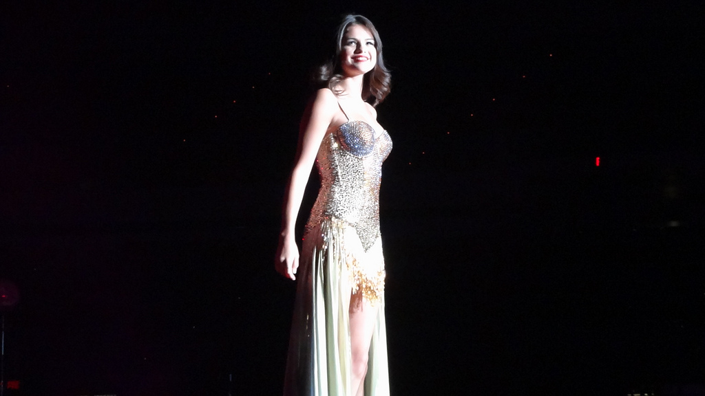 Selena Gomez en el We Own the Night Tour